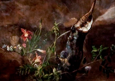 Detall d'un tronc d'arbre tallat, que rebrota. Síbtol tant de la massacre com de la futura ressurrecció dels soldats.